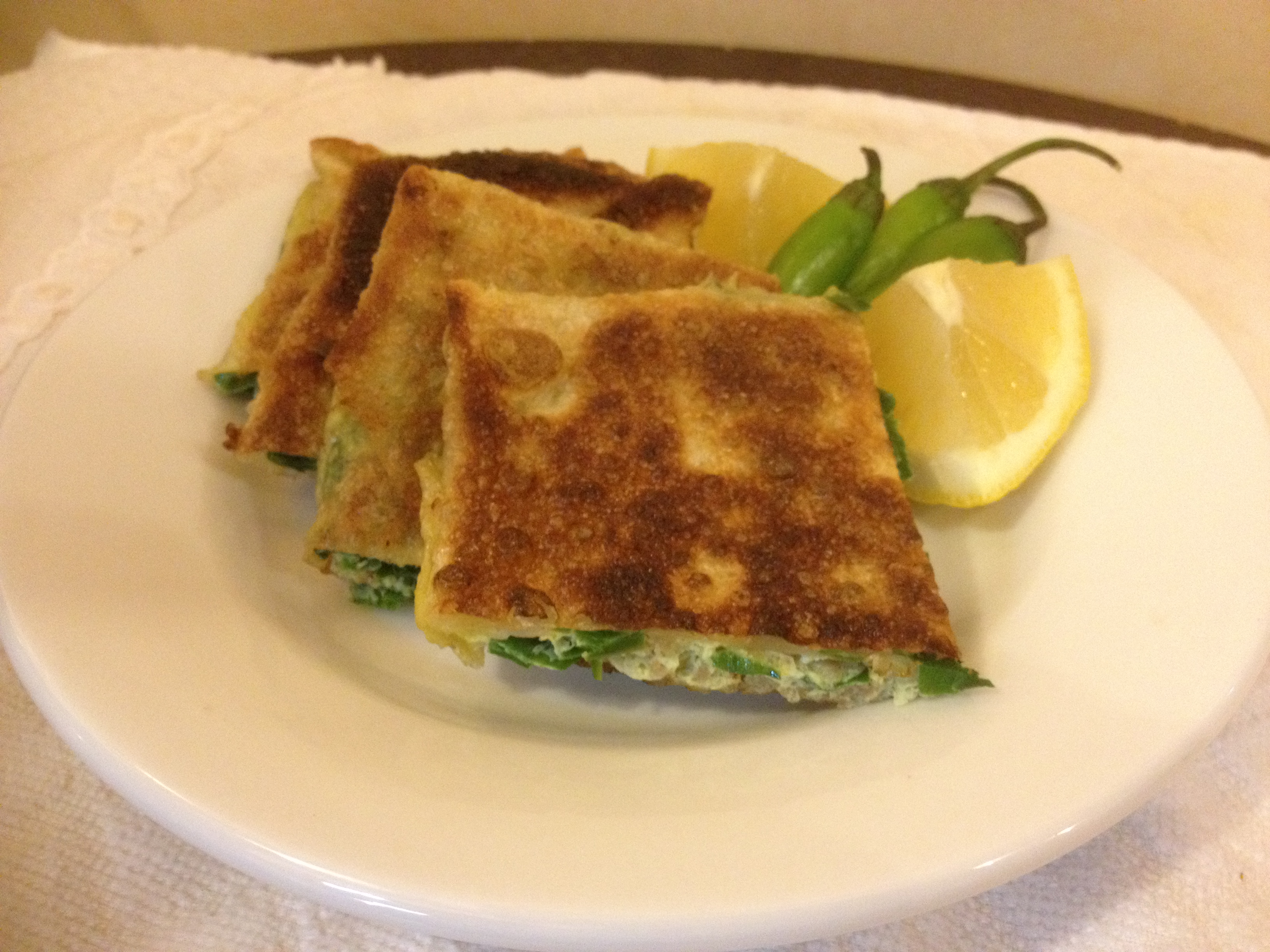 مطبق منزلي